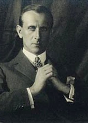 Maximilian Erwin Lobkowicz (1888-1967), šlechtic z knížecí roudnické primogeniturní větve Lobkoviců, právník, politik a diplomat